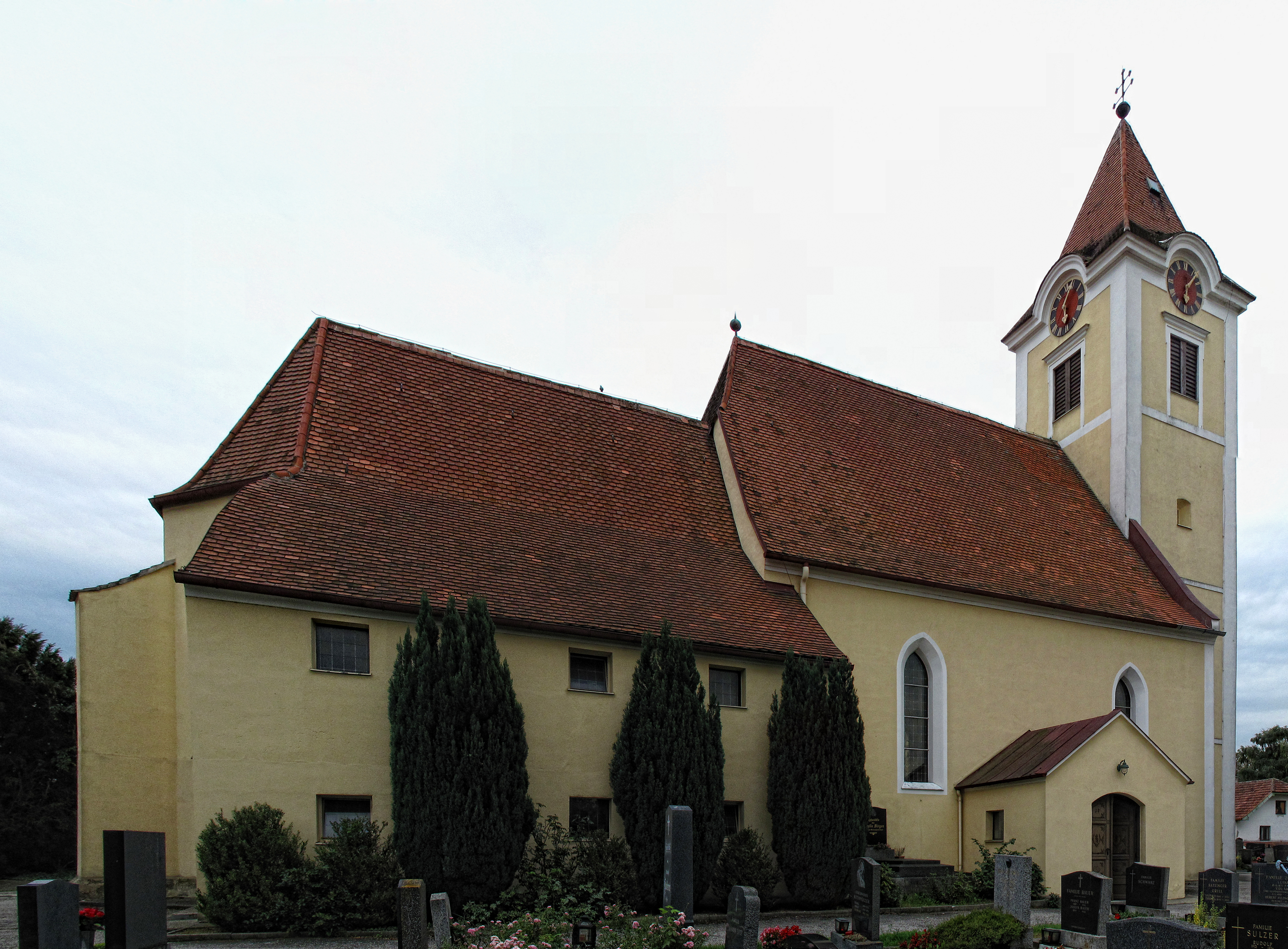 Kath. Pfarrkirche hl. Martin